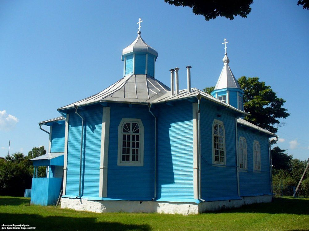 Равяцічы. Свята-Пакроўская царква